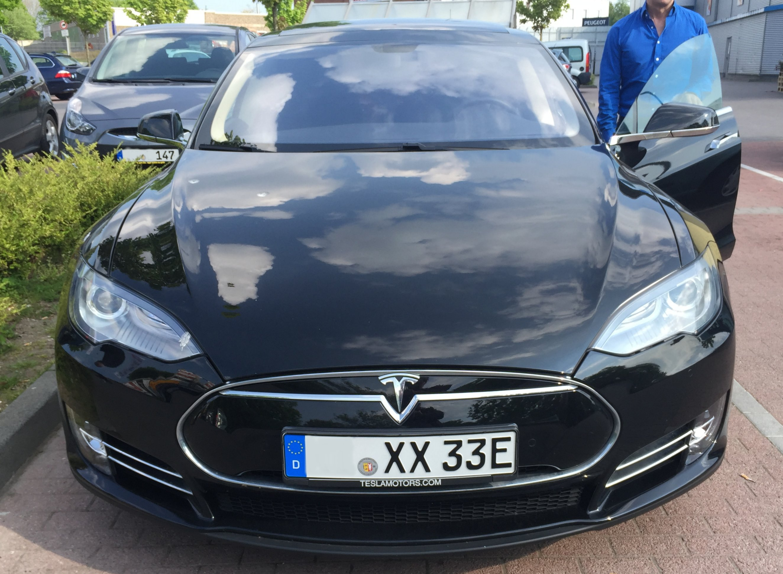 Tesla Model S Frontansicht